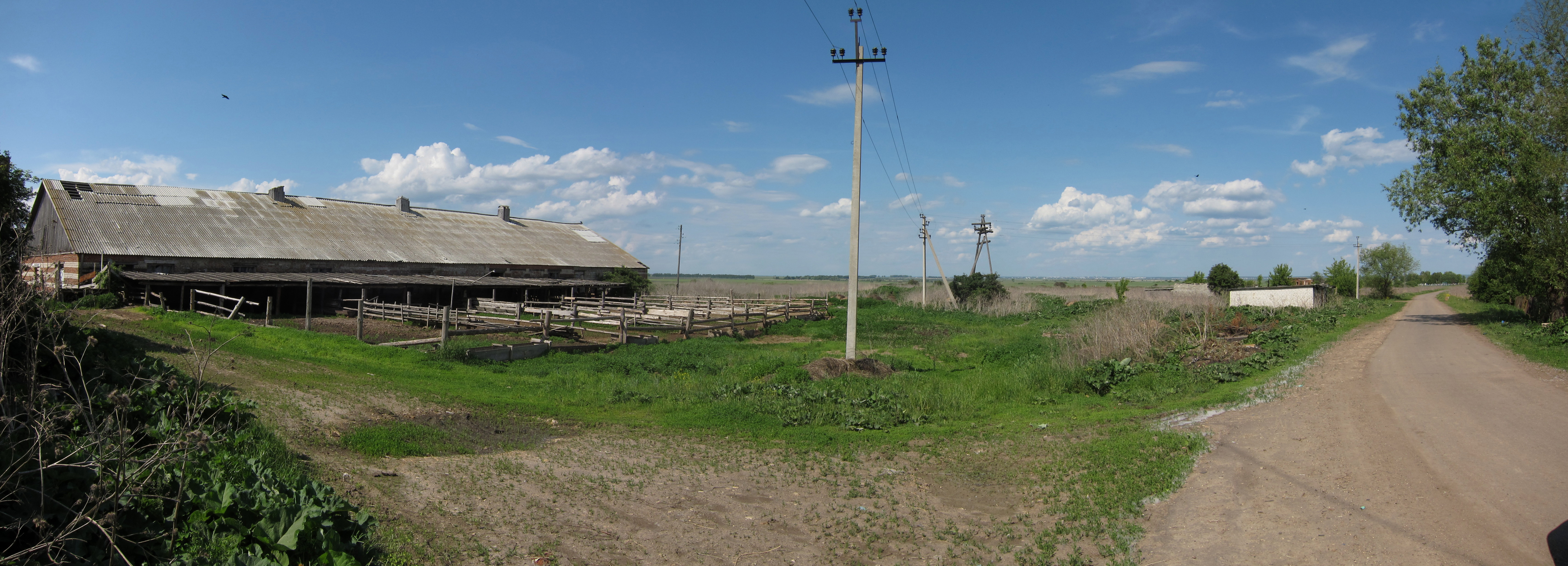 животноводческая ферма